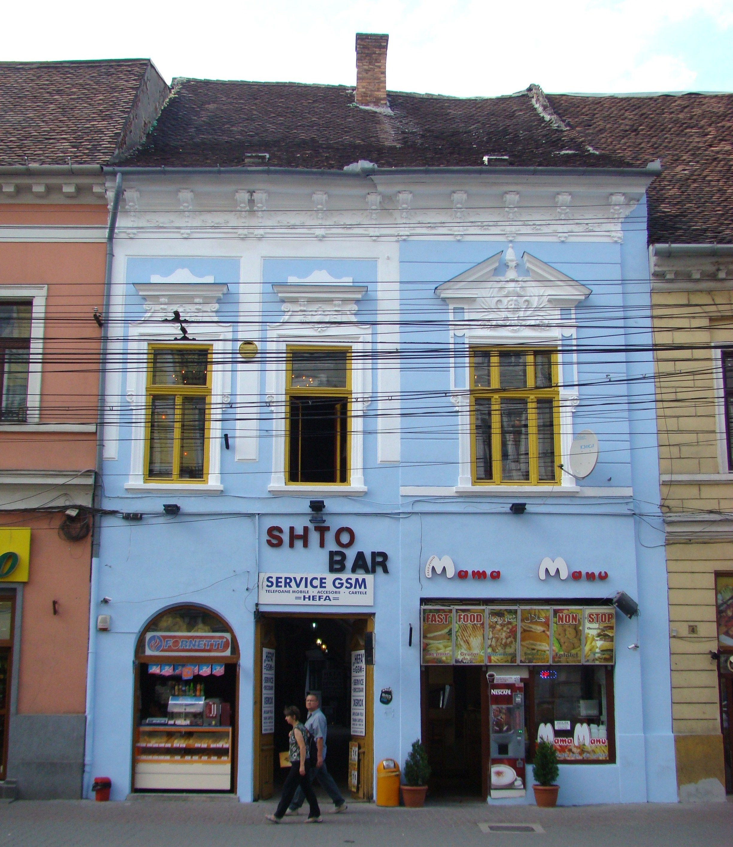 Casă monument istoric, str.Memorandumului, nr. 6